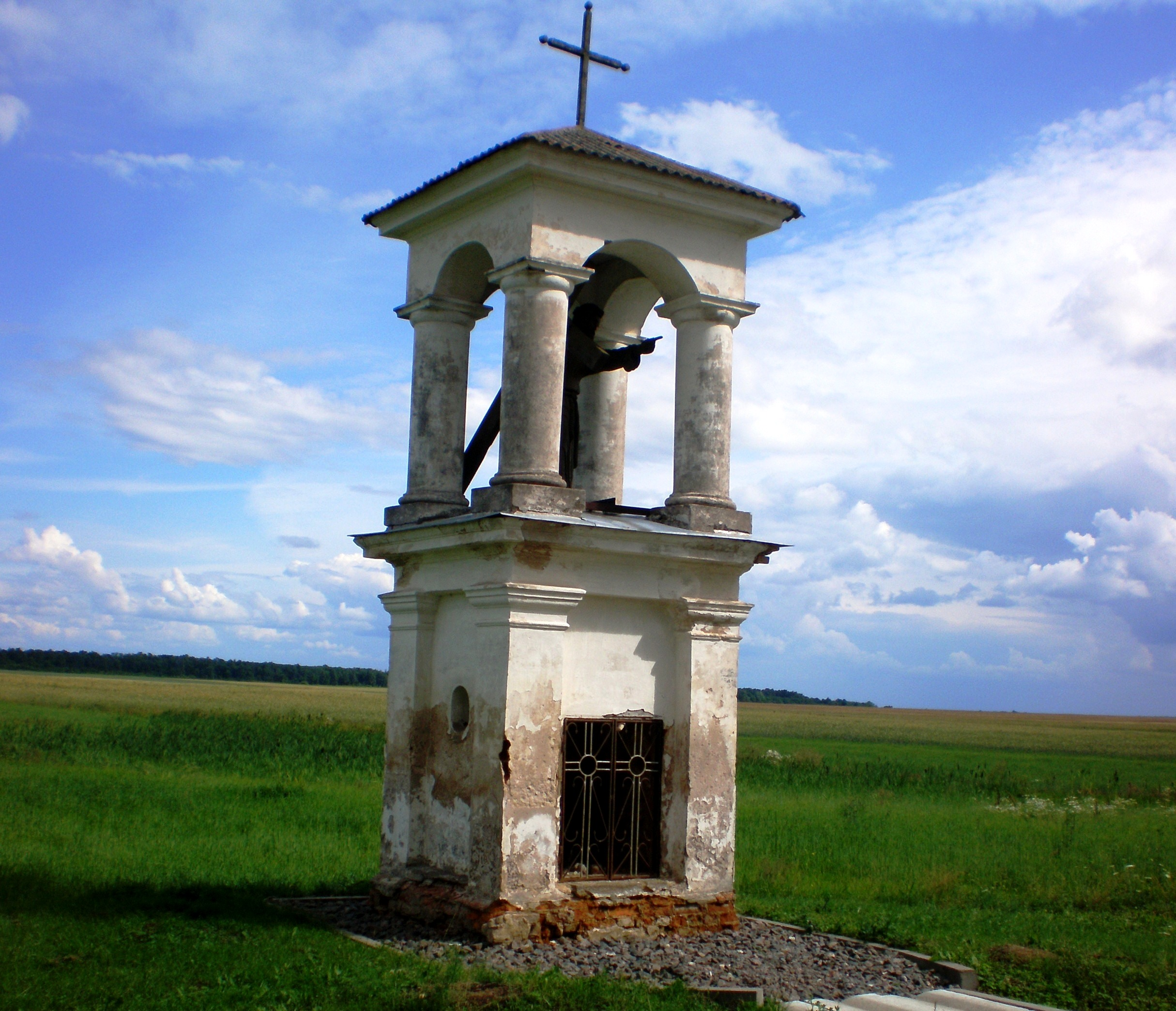 Šlapaberžės koplyčia, Kėdainių raj.